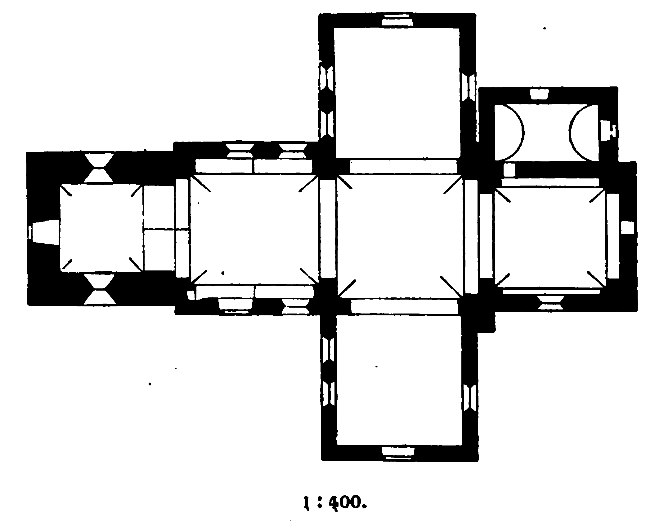 Grundriss der Ev. Kirche in Windheim, Stadt Petershagen